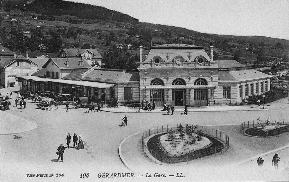 Carte postale ancienne éditée par LL, n°194 : GERARDMER - La Gare Mention de censure : Visé Paris 194 La gare de Gérardmer, le bâtiment monumental construit par la compagnie de l'Est en 1905 pour agrandir l'ancienne gare de la Compagnie du chemin de fer des Vosges que l'on aperçoit à gauche.